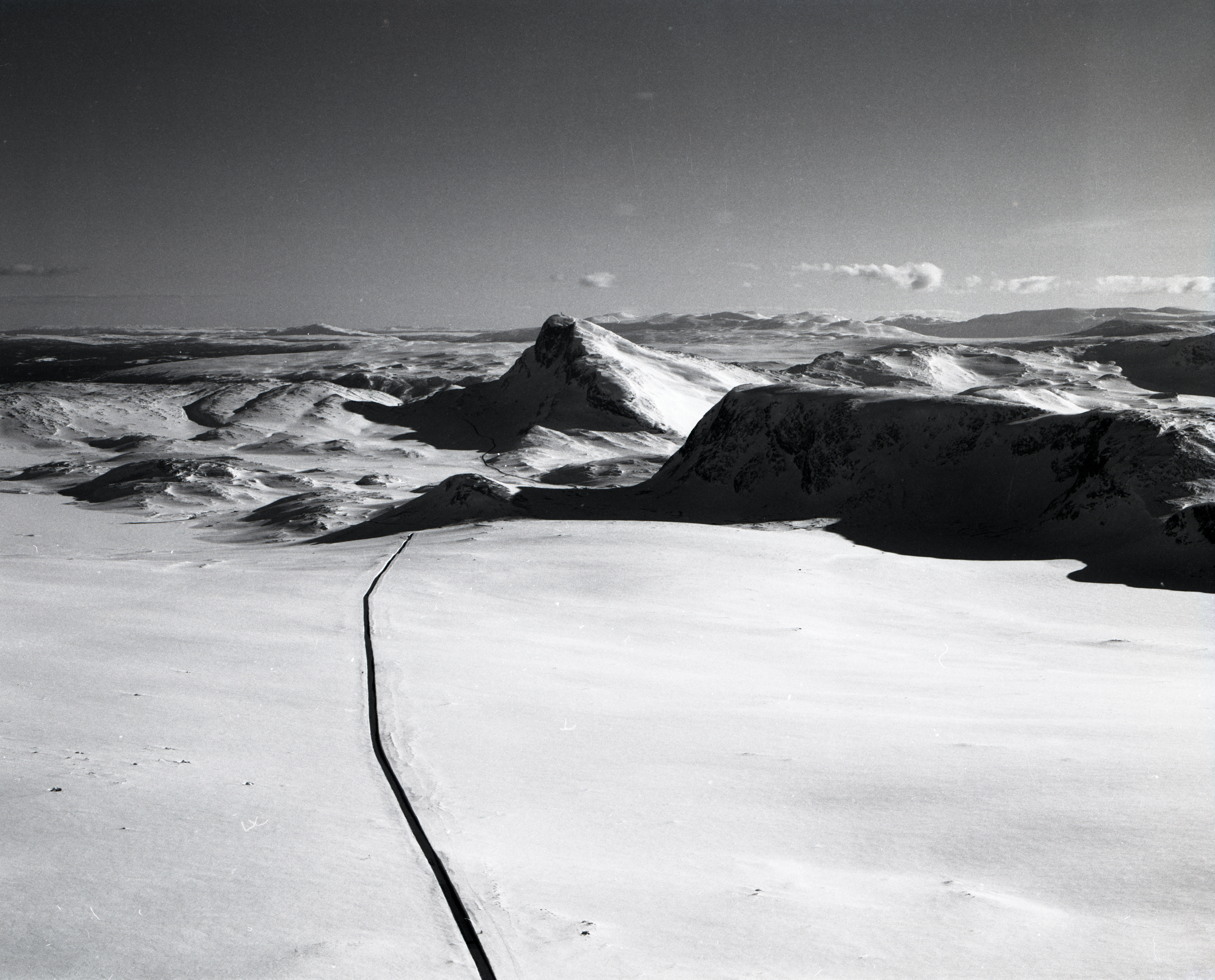 Flyfoto av Valdresflye